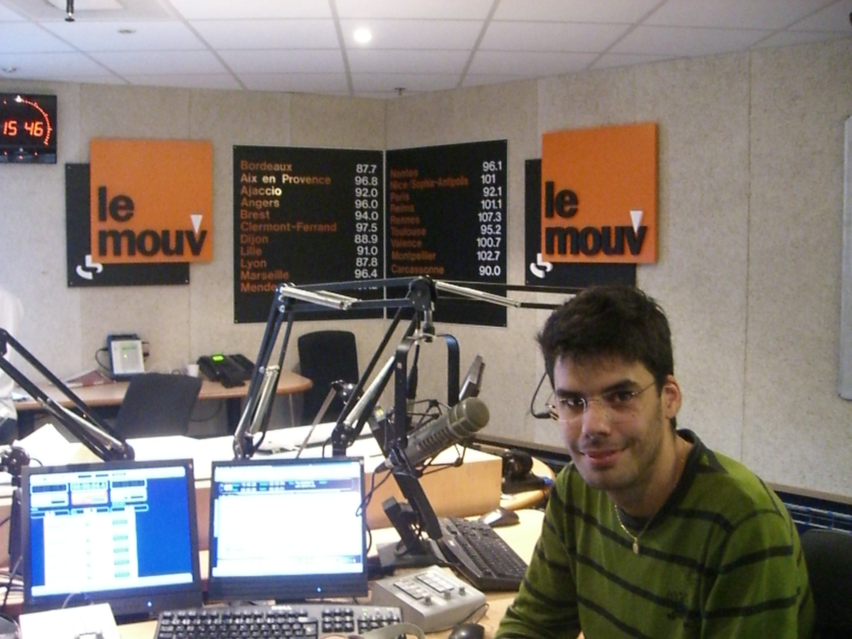 Studio toulousain de la radio Le Mouv' avec un auditeur (moi).